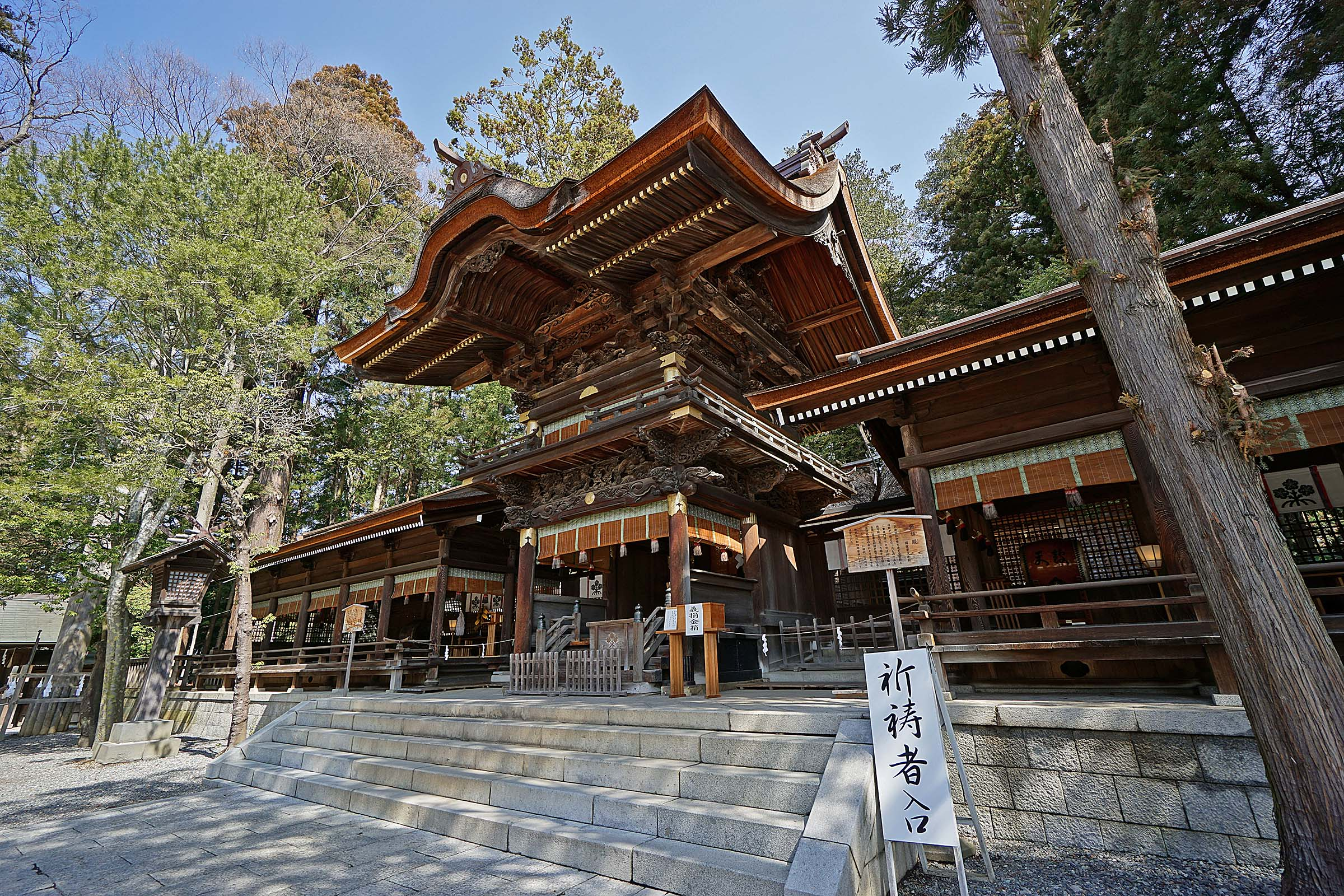 Suwa taisha Shimosha Akimiya , 諏訪大社 下社 秋宮